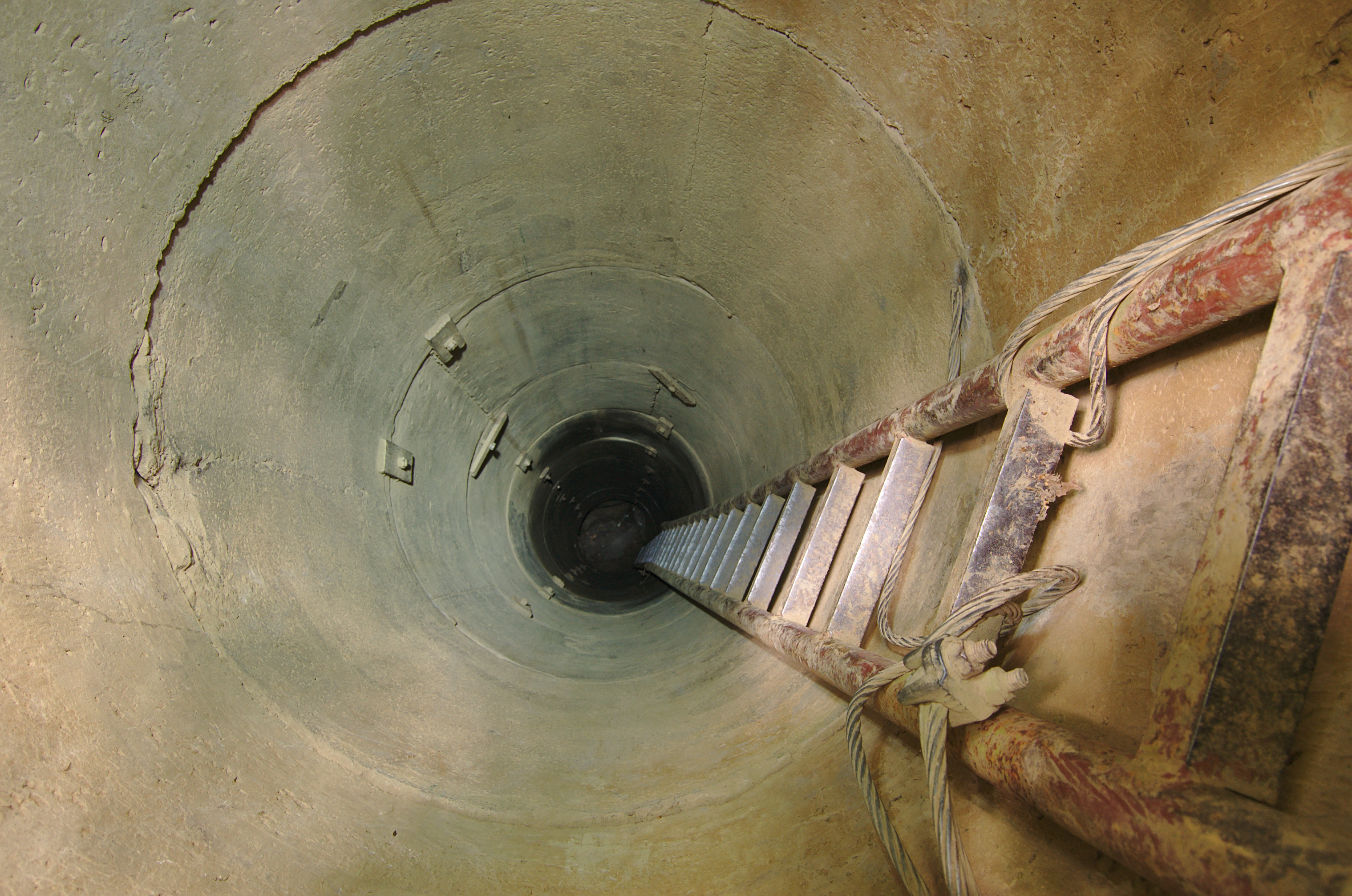 Vchod do jeskyně Piková dáma, Holštejn, okres Blansko